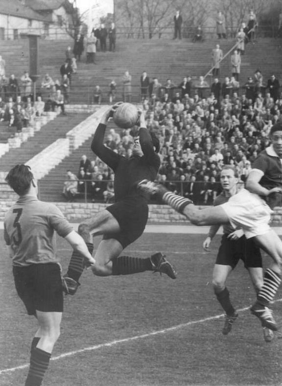 Zentralbild-Wendorf Wen-Qu 22.3.1959 Fußball-Punktspiel im Walter-Ulbricht-Stadion - Der SC Dynamo Berlin und die BSG Lokomotive Stendal standen sich am 22.3.1959 im Berliner Walter-Ulbricht-Stadion im Punktspiel gegenüber. UBz. Diesmal war Lok-Torwart Falke schneller als Dynamo-Spieler Bley (rechts). Köhler (Nr. 3, Lok Stendal) braucht nicht einzugreifen.